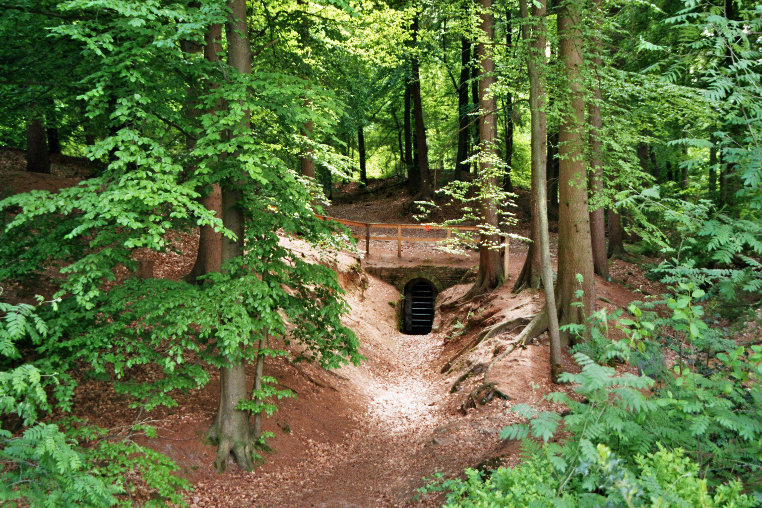 Mundloch des Steinbecker Stollens im Buchholzer Forst, Recke-Steinbeck, Kreis Steinfurt, Nordrhein-Westfalen, Deutschland. Ein großer Teil des Waldgebietes gehört zum Landschaftsschutzgebiet Martensberg (LSG-3612-0002).